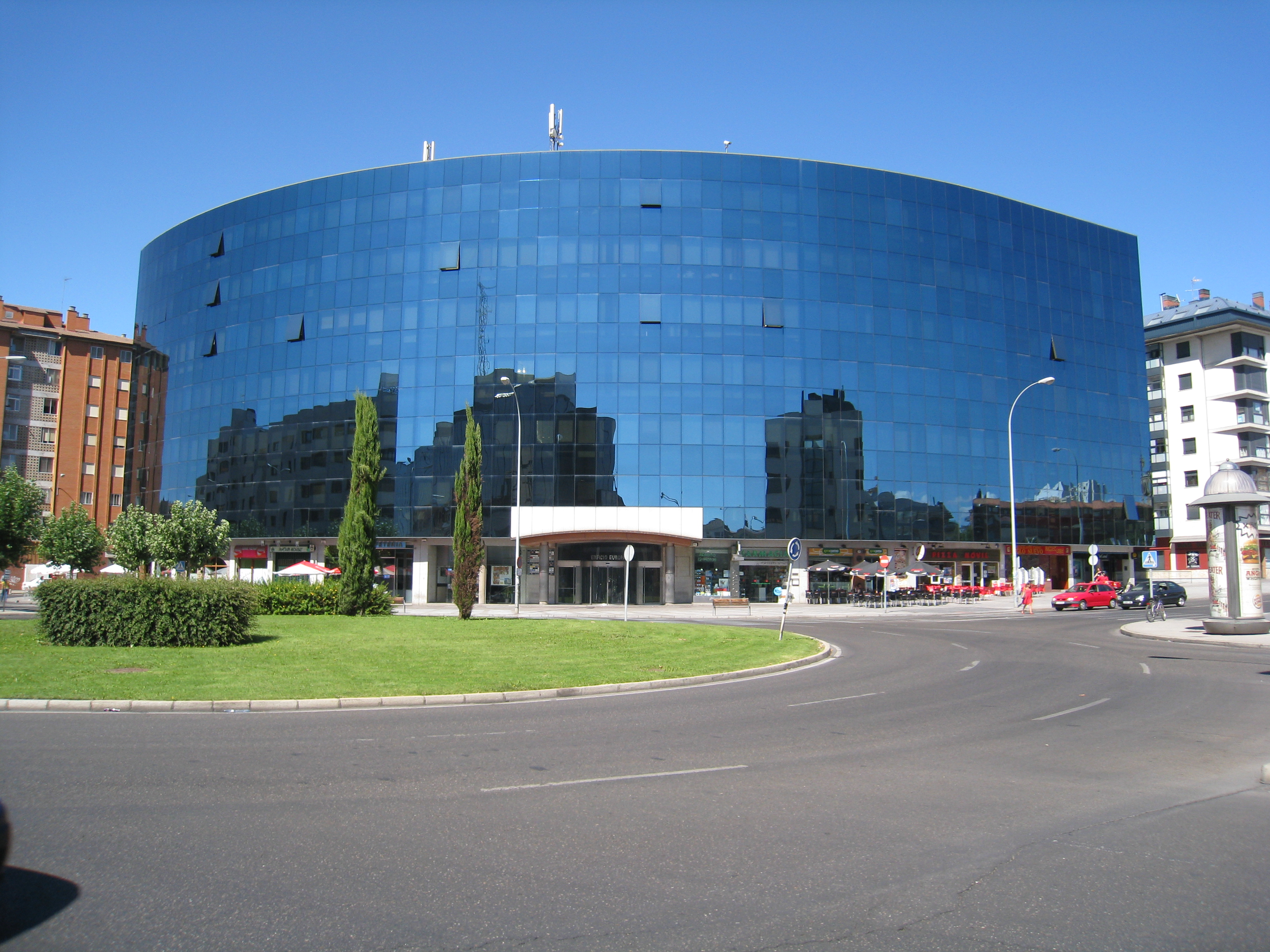 Edificio Europa em Leon